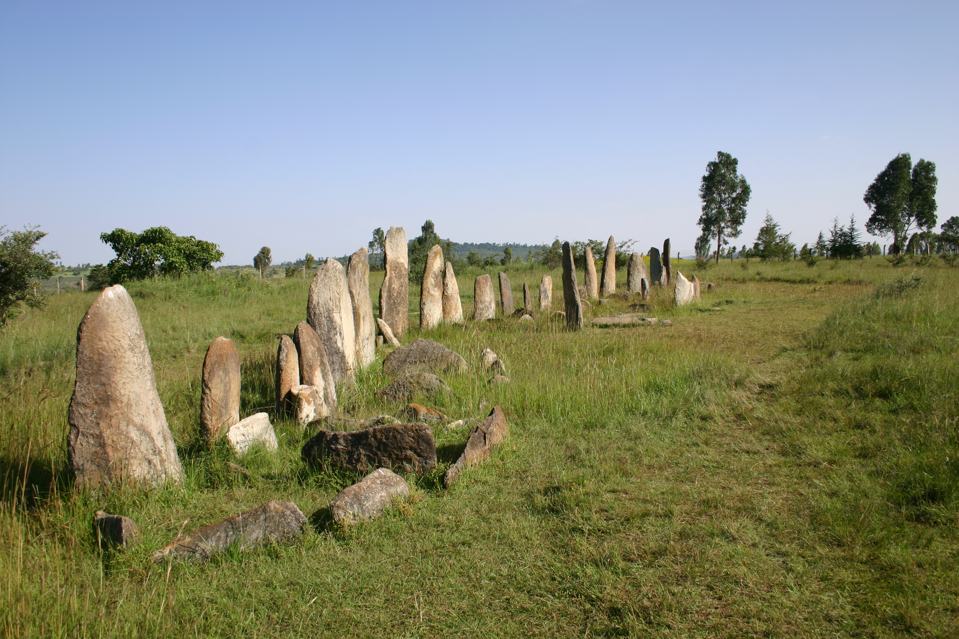 Vue d'ensemble des stèles